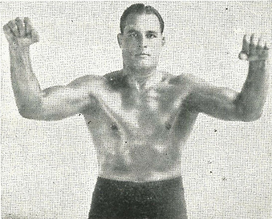 Couverture du magazine Arena News Wrestling du 3 avril 1940 incluant Lee Wykoff.